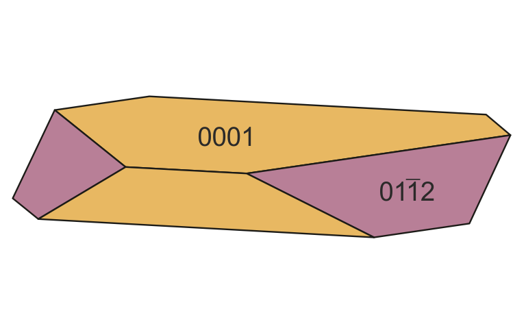 Kristallzeichnung eines dicktafeligen Asbecasit-Kristalls unter Zugrundelegung einer Vorlage in Stefan Graeser & Aldo G. Roggiani (1976): „Occurrence and genesis of rare arsenate and phosphate minerals around Pizzo Cervandone, Italy/Switzerland“. - Rendiconti della Società Italiana di Mineralogia e Petrologia XXXII (1), 279–288 (